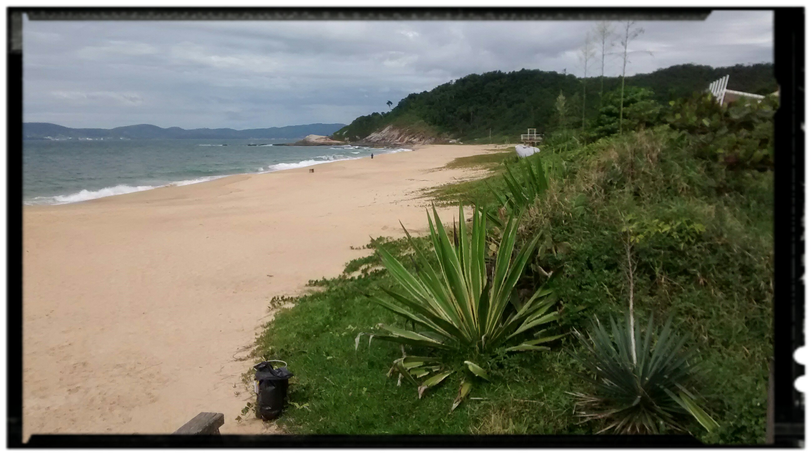 Tarde de sol nessa praia em Balneário Camboriú